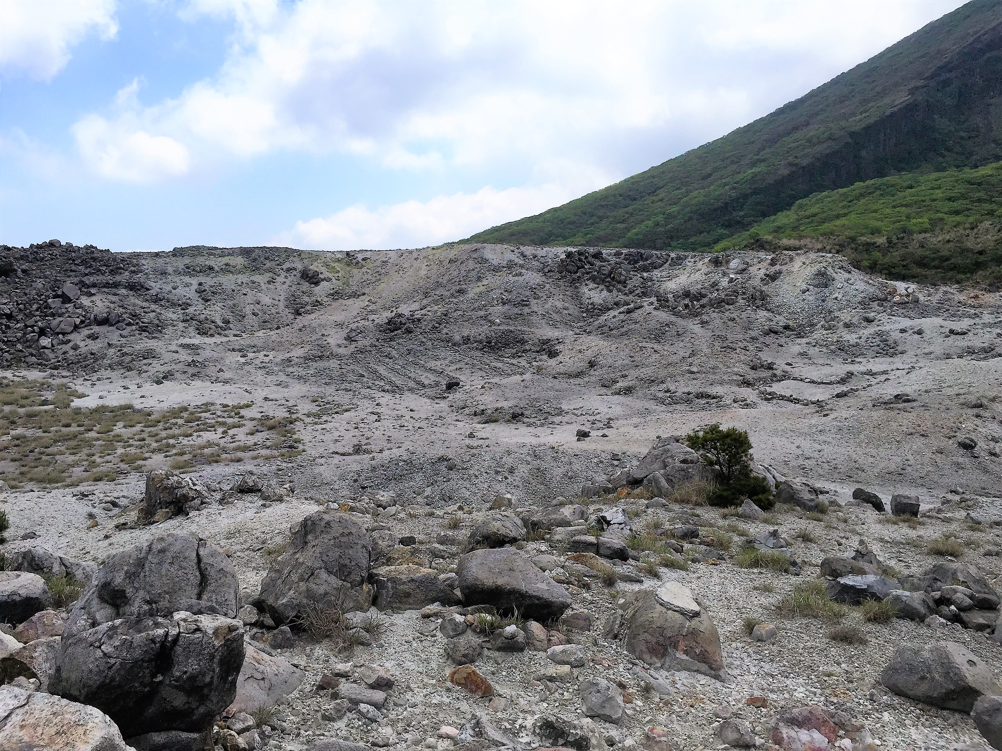 宮崎県の硫黄山火口。2015年5月5日撮影。この頃は硫黄山には高熱帯や噴気は確認されていなかった。